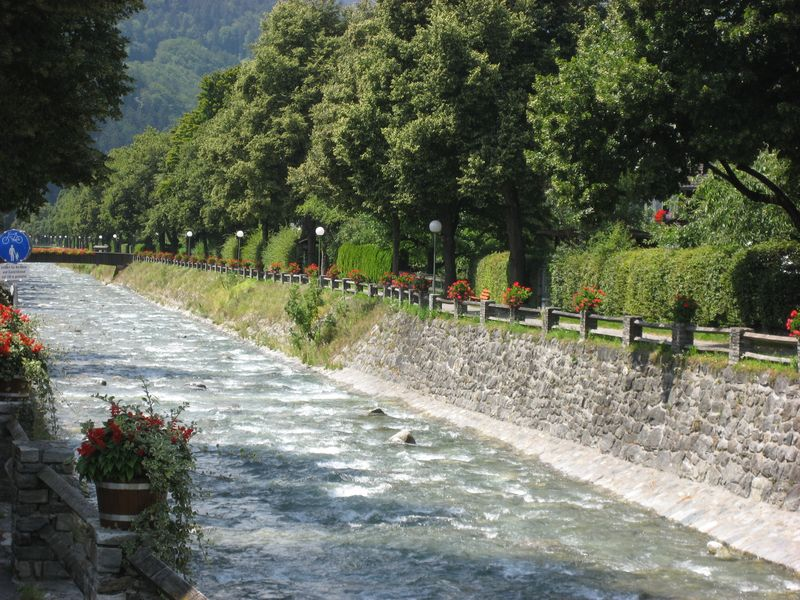 Litzpromenade in Schruns